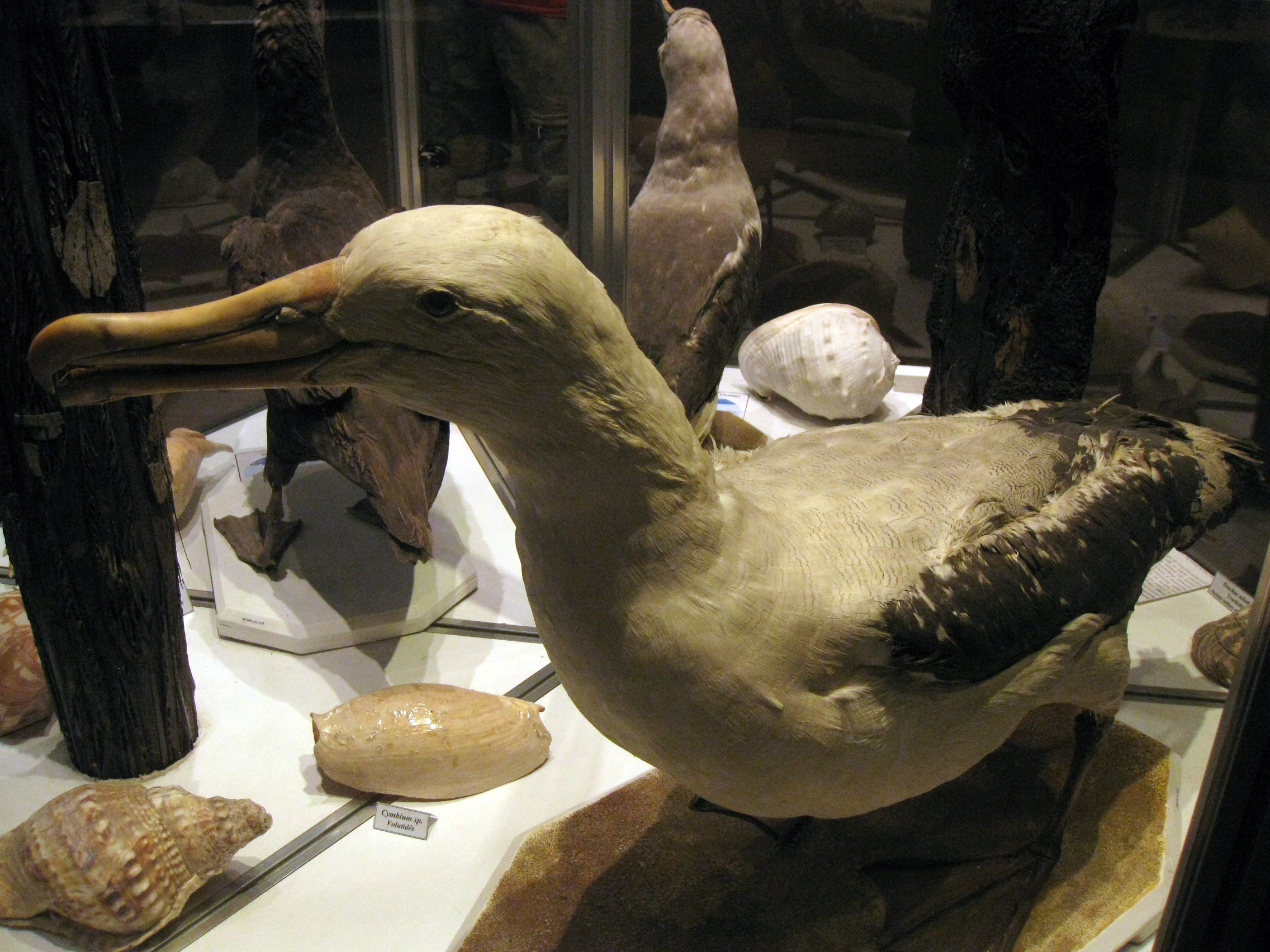 Museu d'Història Natural de Perpinyà, antic palau Sagarriga, albatros viatger (Diomedea exulans) .